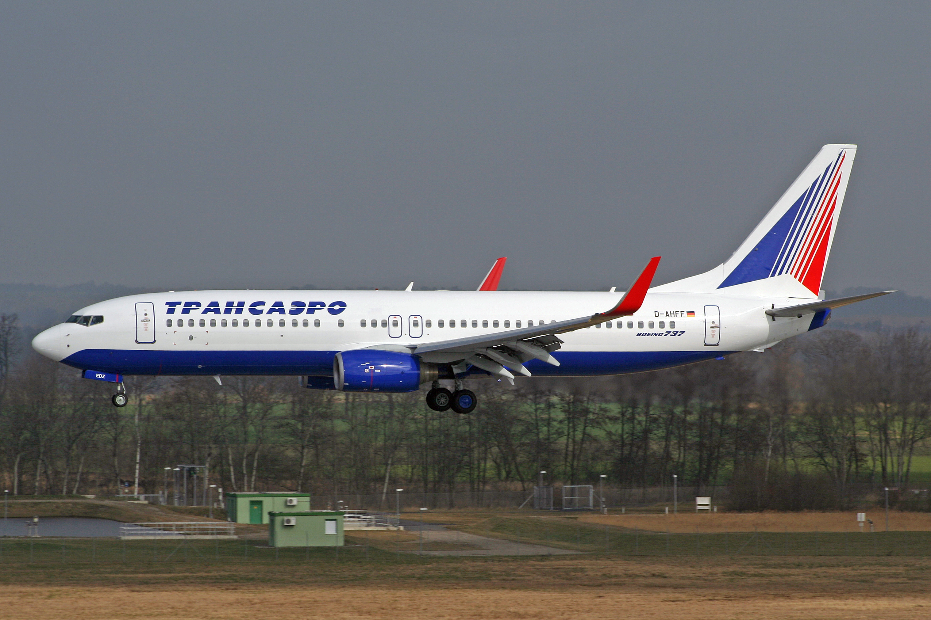 Transaero Boeing 737-800 at Hanover